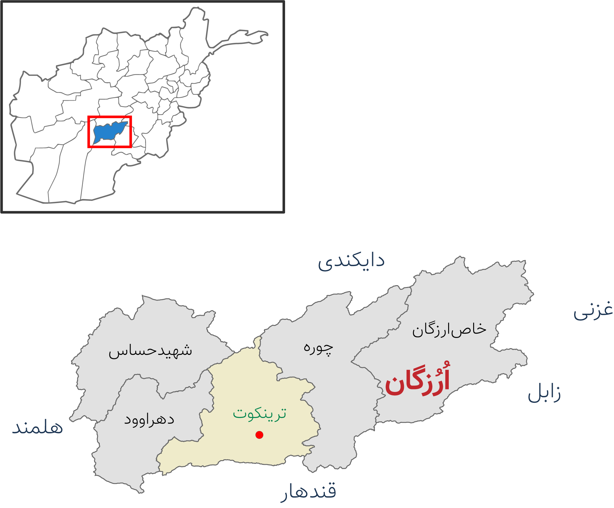 نقشه ولایت اروزگان